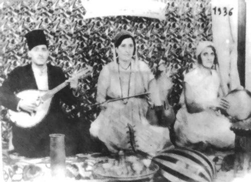 Musiciens algériens, Abdelkrim DALI [1914-1978], Cheïkha Tetma (Fatéma TABET) [1891-1962] & Tamani, Alger en 1936.